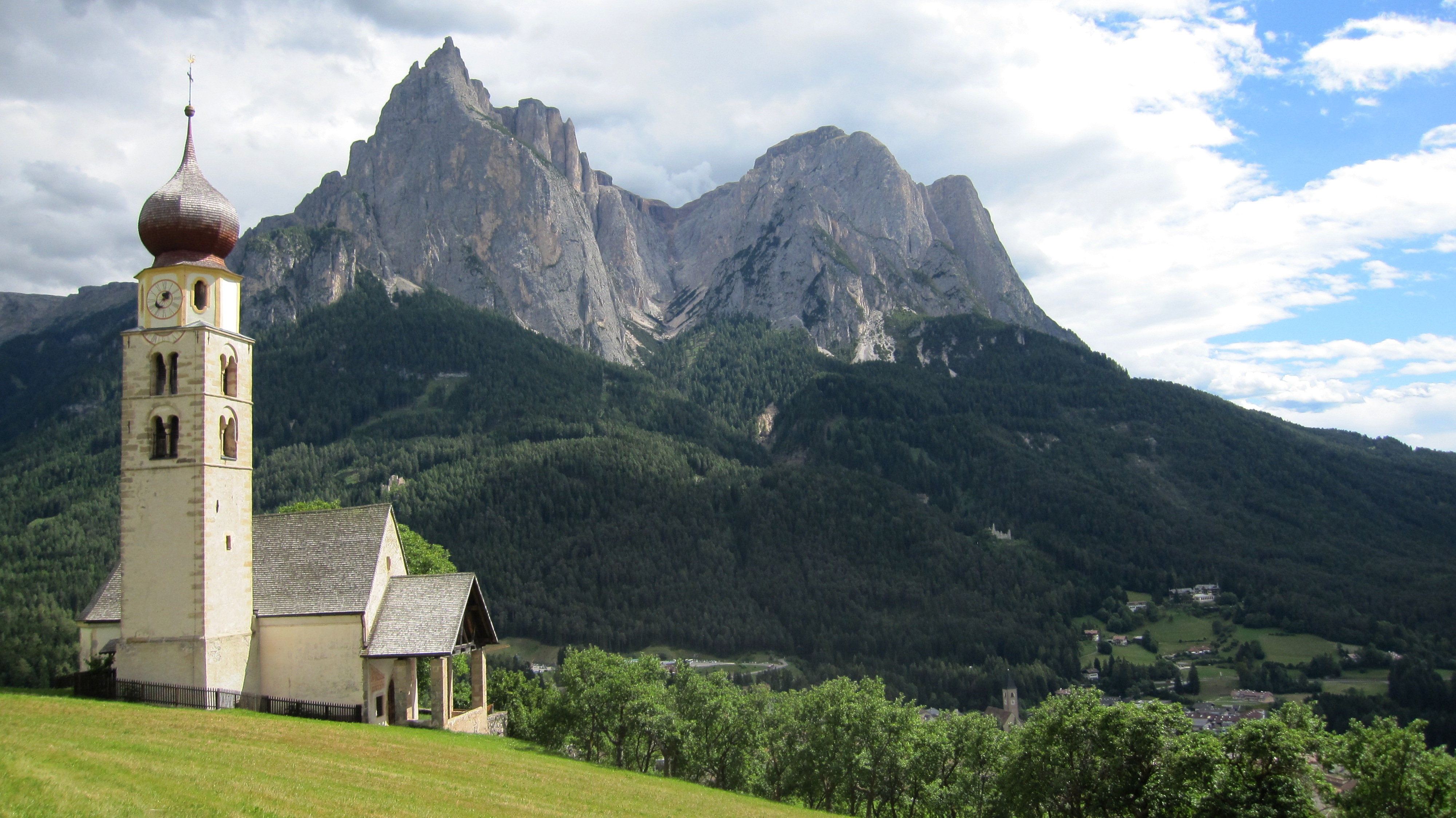 St. Valentin über Seis, im Hintergrund das Schlern-Massiv